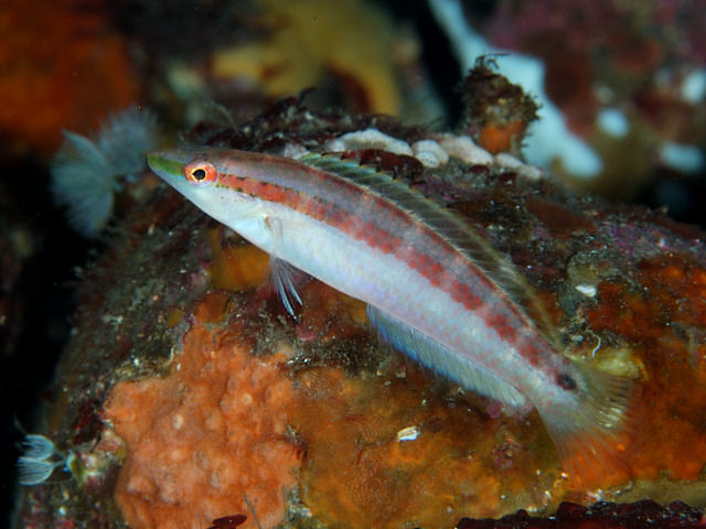 イトベラ Suezichthys gracilis